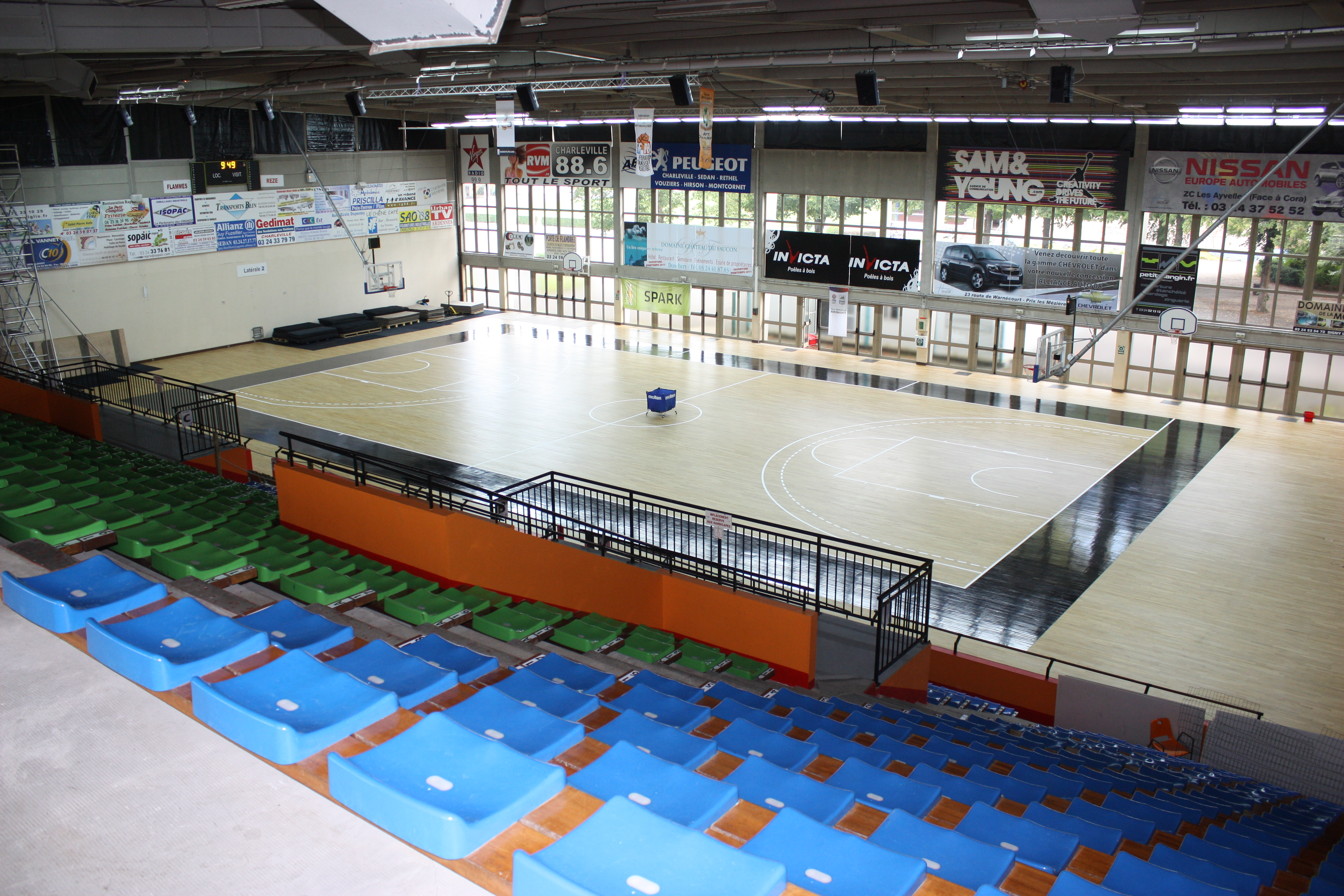 La salle Bayard, à Charleville-Mézières (Ardennes, France), où jouent les Flammes Carolo, club de Ligue féminine de basket.